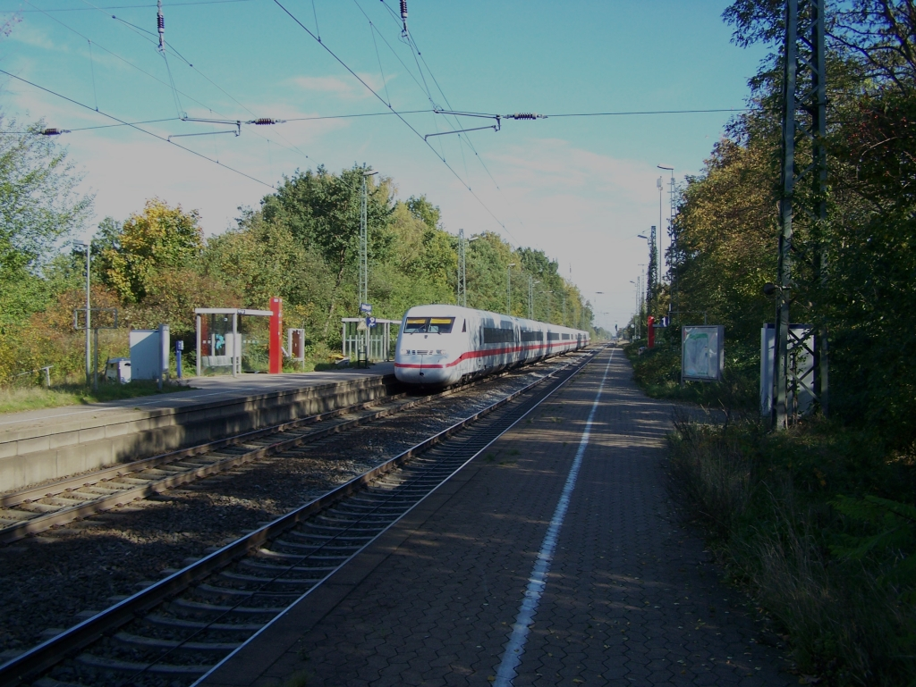 Am Bahnhof in Großburgwedel